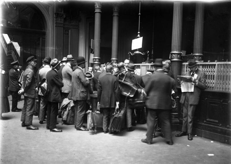 Die katastrophale Geldentwertung in Deutschland. Anstellen vor den Kassen der Reichsbank in Berlin. Das Publikum hat sich mit grossen Geldtaschen versehen, um die Menge des Geldes transportieren zu können.